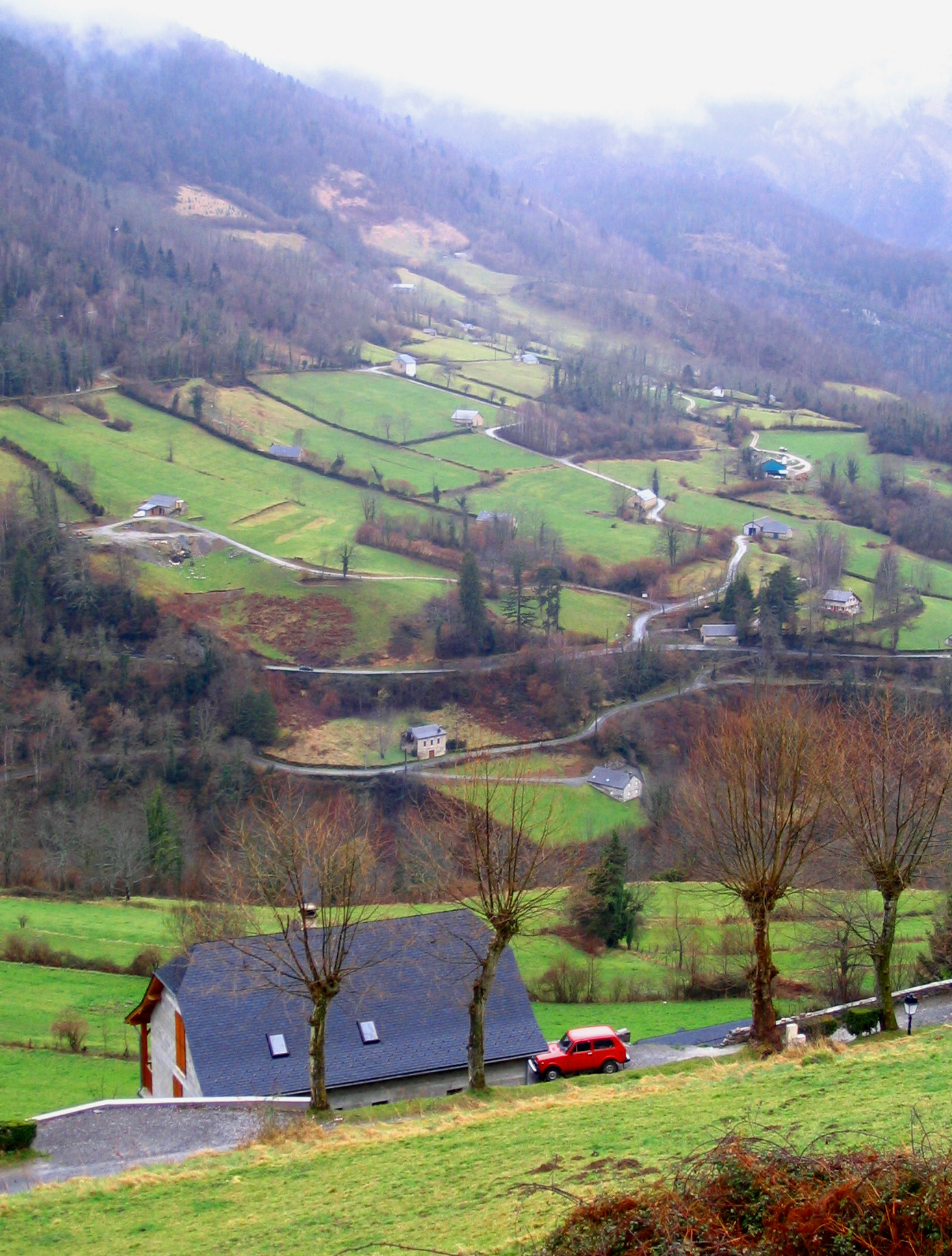 Vue de la Vallée d'Ossau - Pyrénées Atlantiques - France Auteur: P.Charpiat - 2007